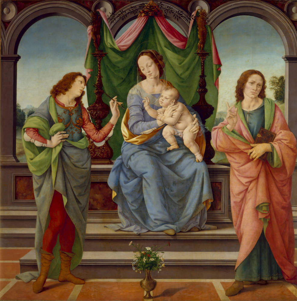 María con el niño, San Sebastián y San Juan Evangelista. Lorenzo di Credi